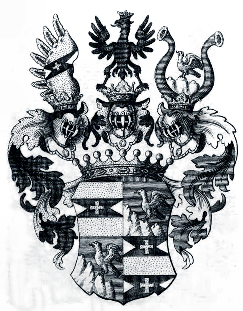 Wappen der Grafen von Hartig ab 1719